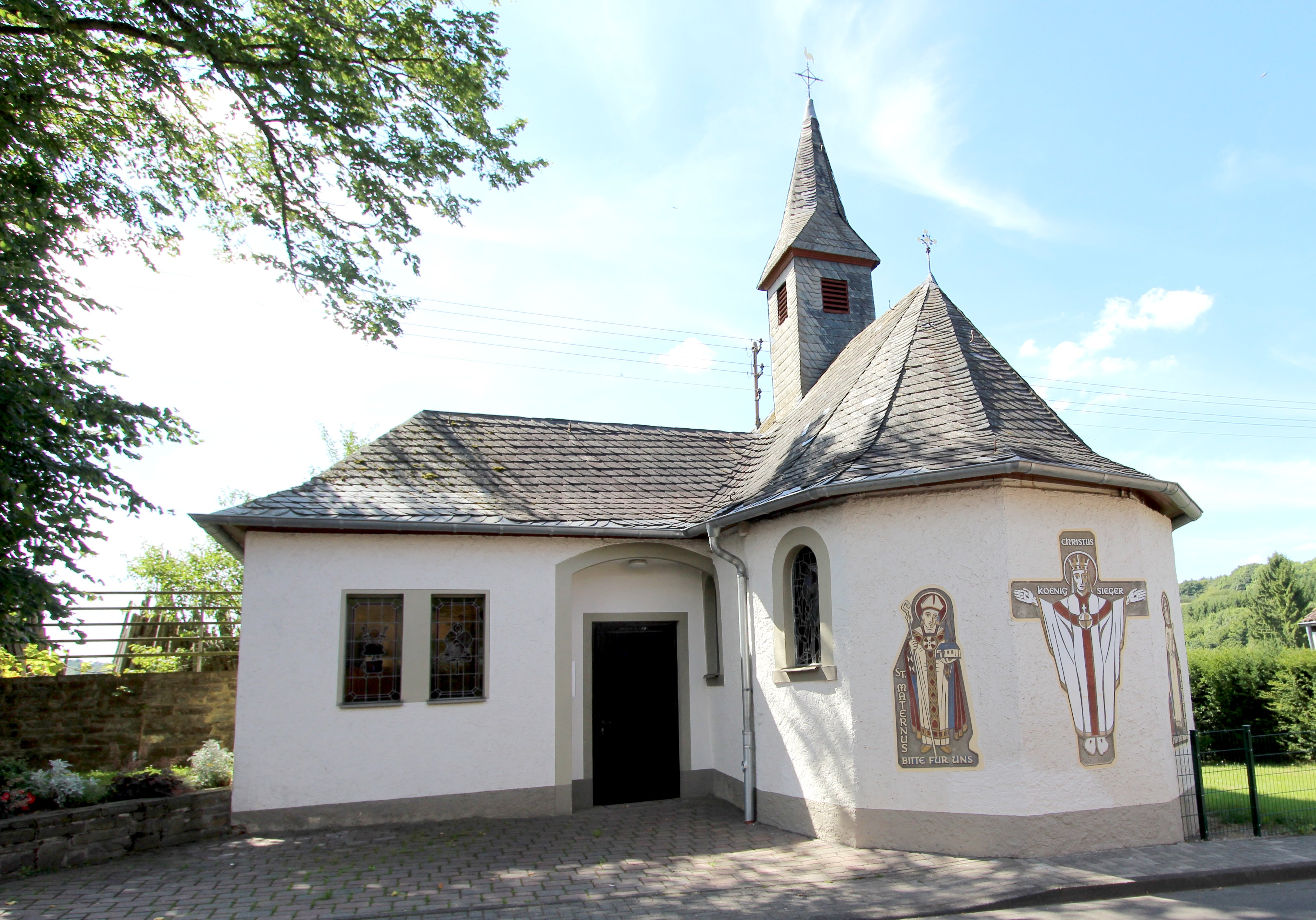 53506 Lind, Ortsteil Plittersdorf, Dorfstraße 24. Kapelle St. Marternus. Aufnahme von 2017.